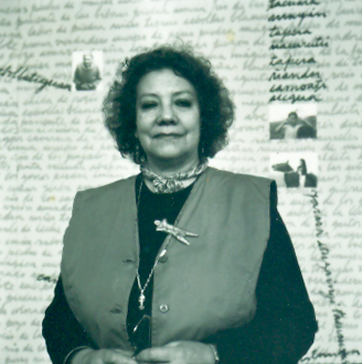 Nelbia Romero en la inauguración de la muestra "Más allá de las palabras". Centro de Exposiciones del Palacio Municipal, Montevideo, Uruguay, entre noviembre y diciembre 1992